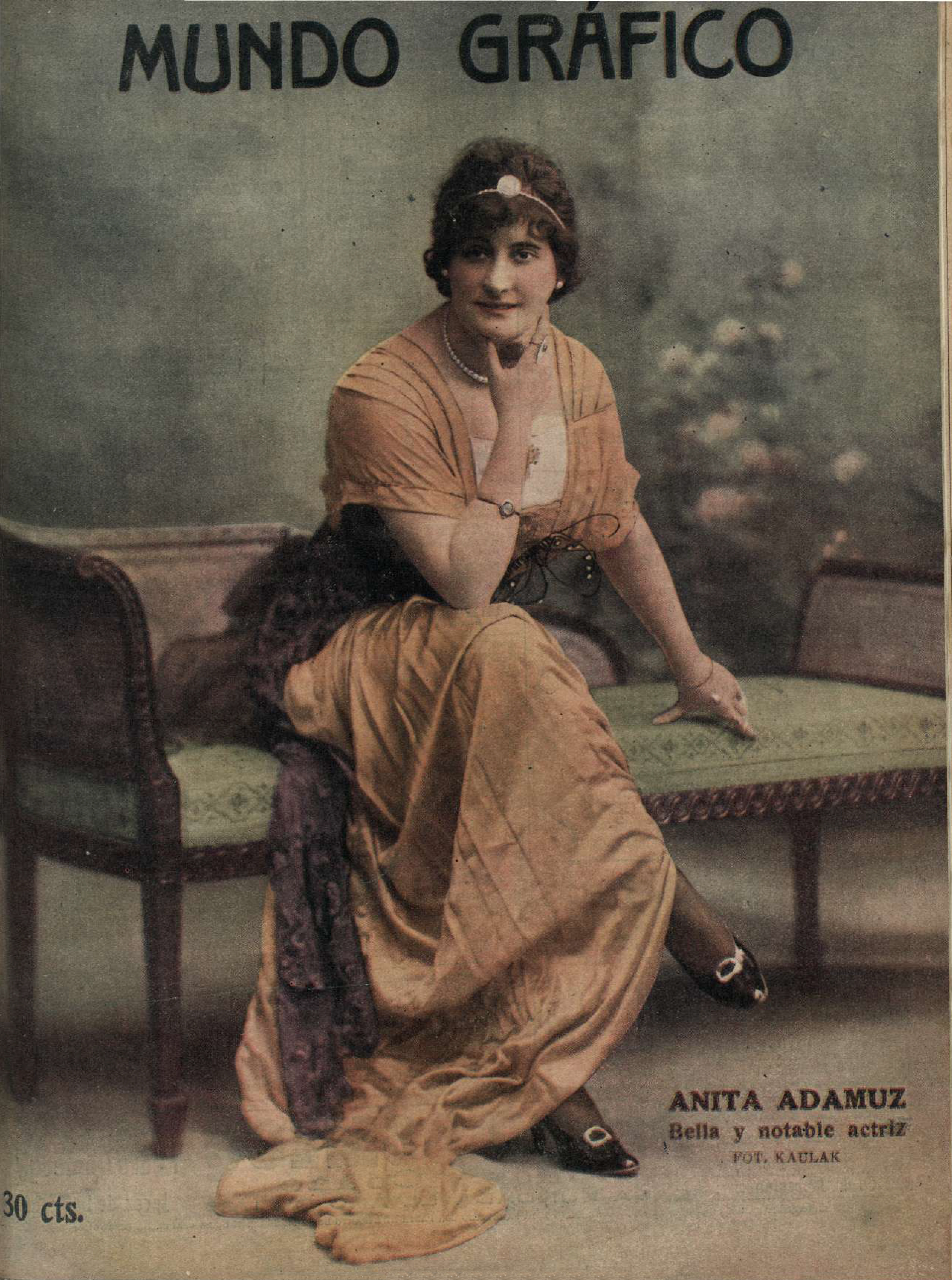 Anita Adamuz, bella y notable actriz.